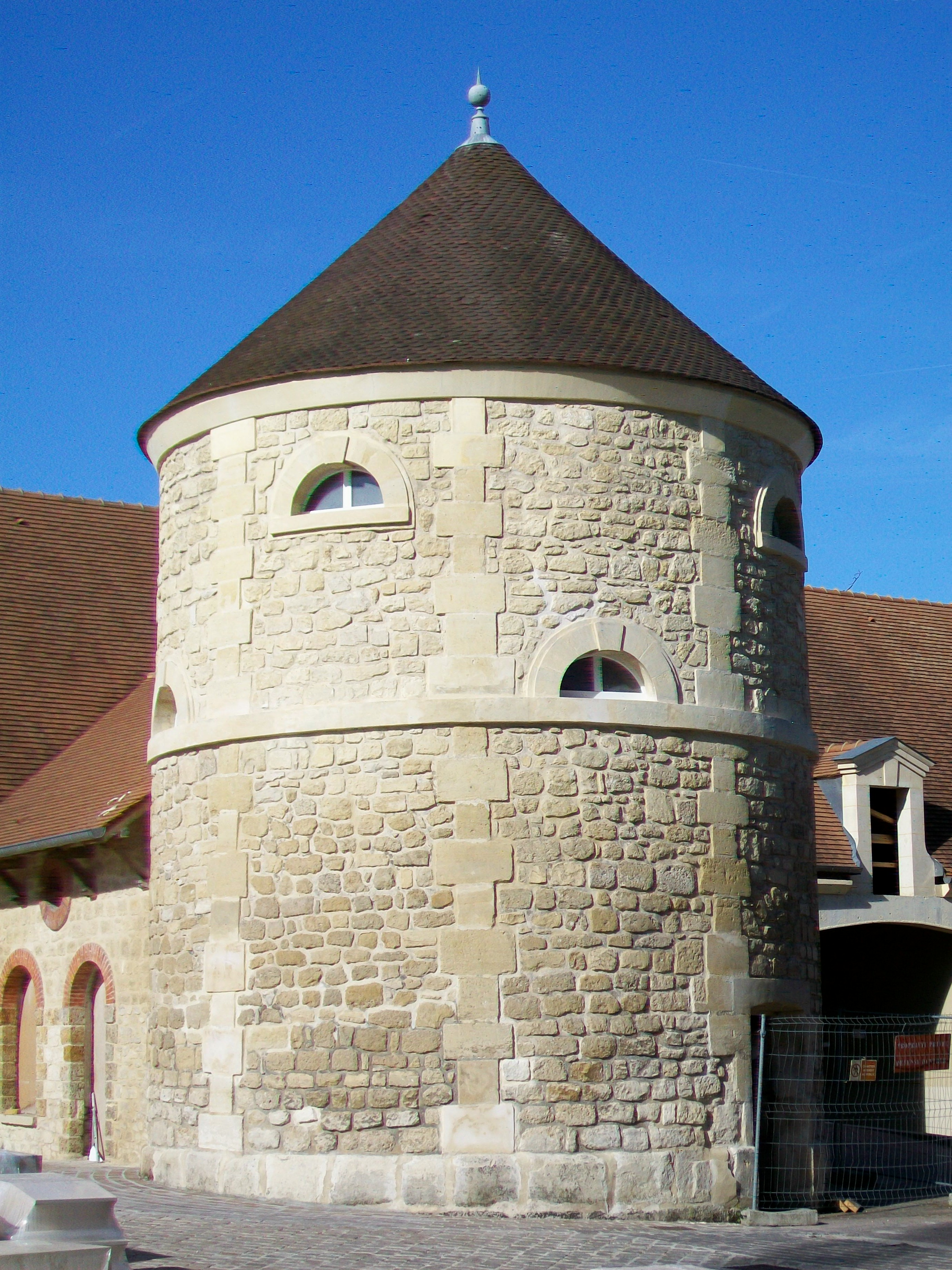 Le colombier du XIXe siècle sur la cour des communs du château.